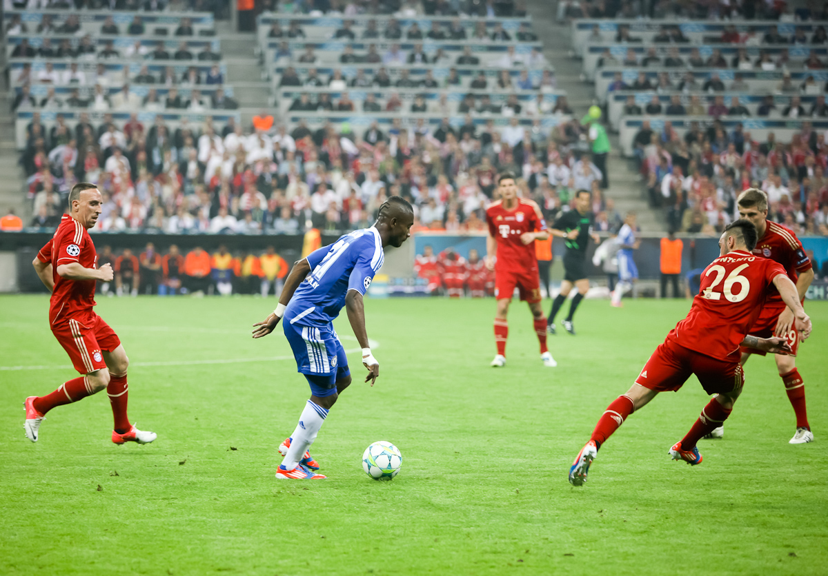 RA1_6134